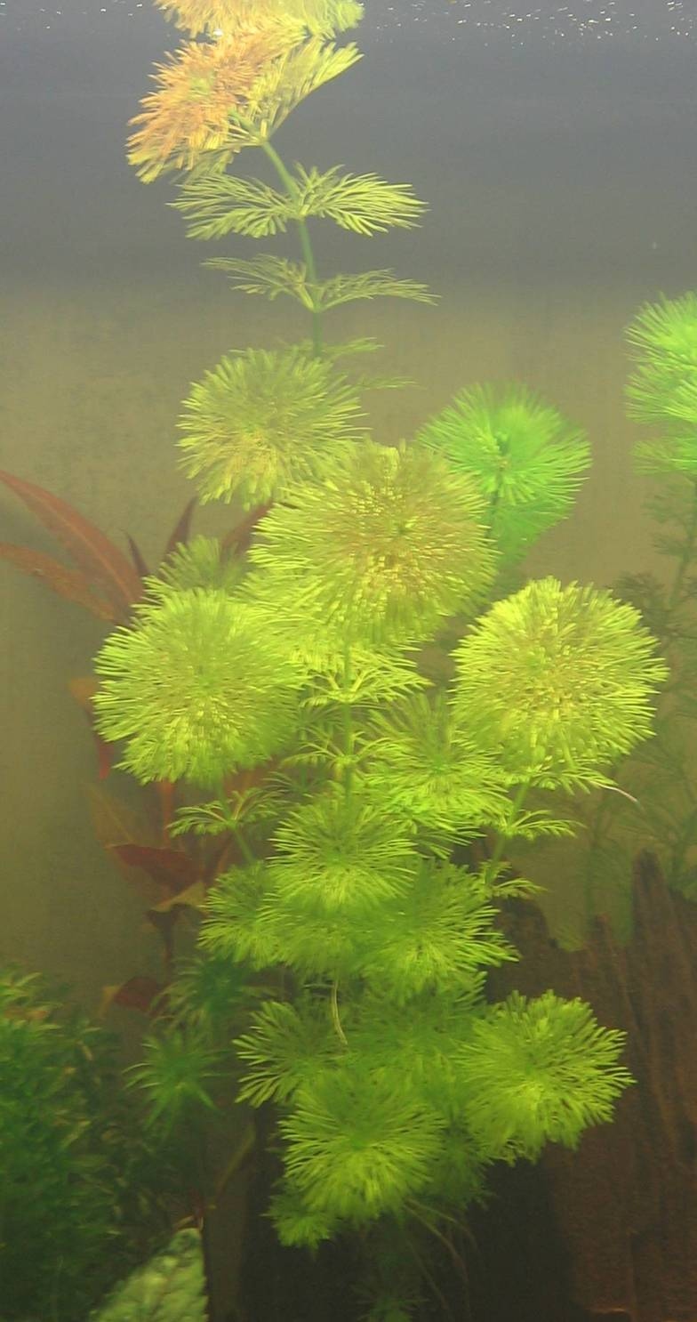 Limnophila sessiliflora - Blütenstielloser Sumpffreund Süßwasser Aquarienpflanze, die in einem Temperaturbereich von 22°C bis 28°C gepflegt werden kann. Der pH-Wert sollte zwischen 6,0 und 7,5 liegen. Die Pflanze wächst bei guter Nährstoffversorgung (u.a. Eisendüngung) bis zur Beckenhöhe und dort flutend. Die Vermehrung erfolgt durch Abtrennen von Seitentrieben und Einsetzen von Stecklingen.